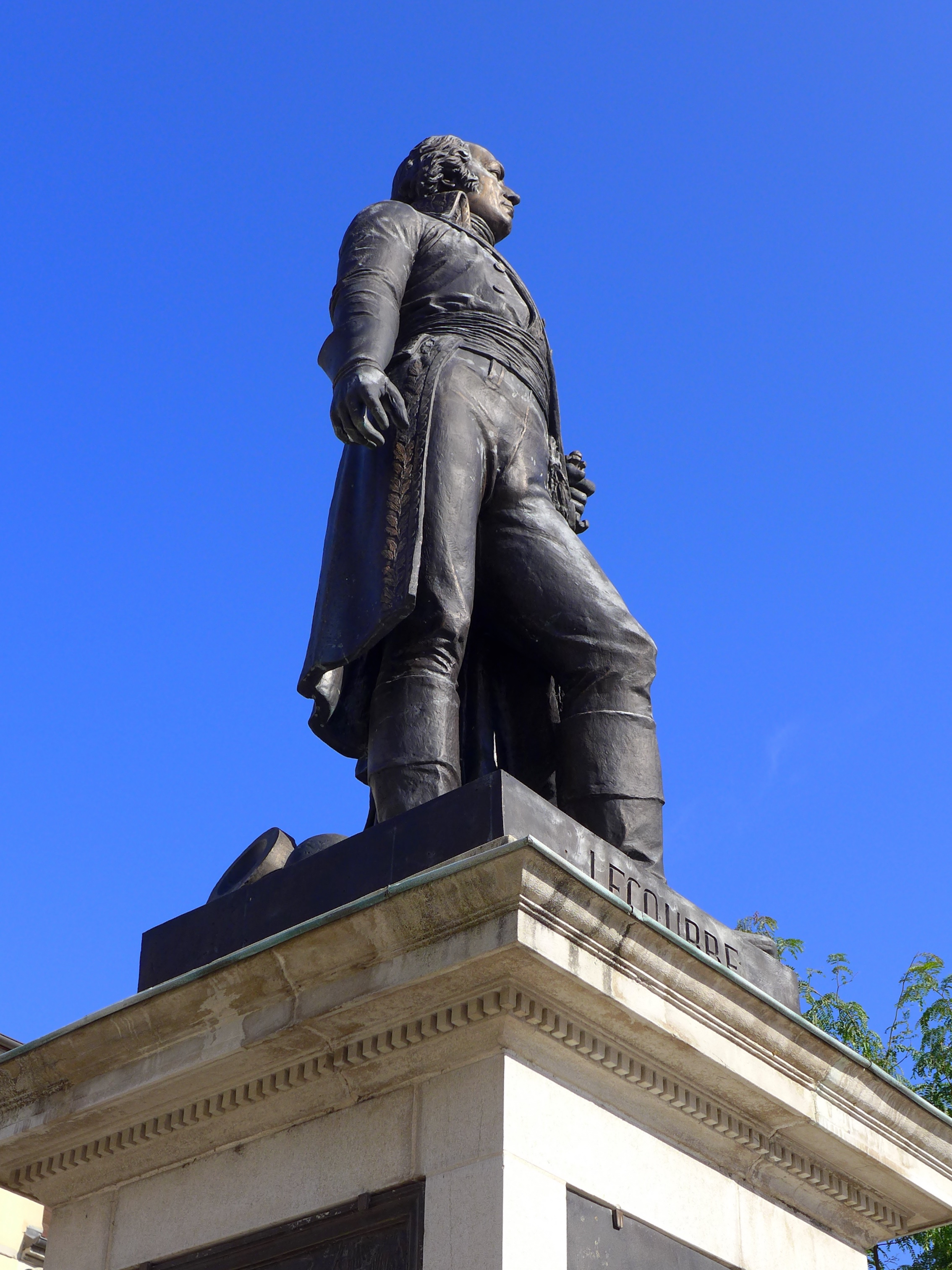 Vue de trois quarts de la statue du Général Lecourbe par le sculpteur Etex, place de la République à Lons le Saunier, Préfecture du Département du Jura en Franche Comté .